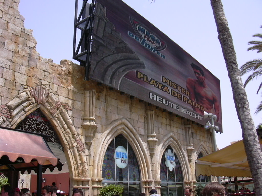 Die Außenleinwand des Mega Park zur Straße/zum Strand hin